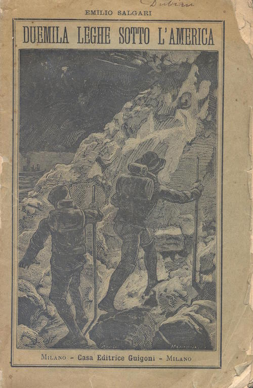 Emilio Salgari, Duemila leghe sotto l'America, 1888. Copertina di Quinto Cenni (1845-1917).